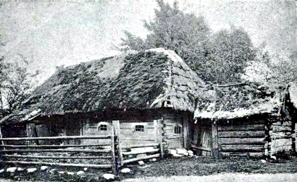 Ostatnia a zarazem najstarsza kurna chata pod miasteczkiem Porozowem w pow. Wołkowyskim (gubernia Grodzieńska). Ilustracja do książki Zygmunt Gloger - Budownictwo drzewne i wyroby z drzewa w dawnej Polsce (1907)